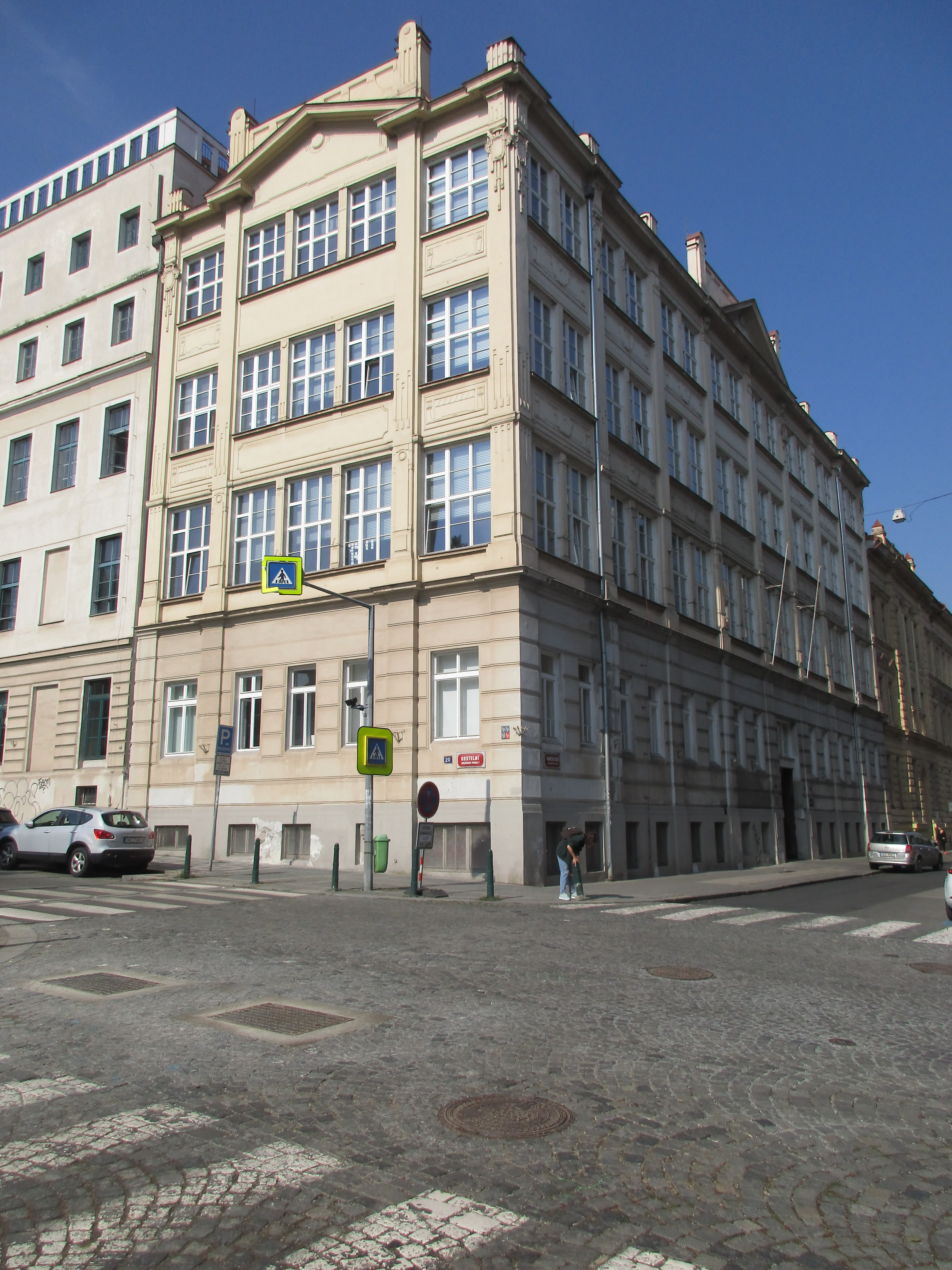 Grafický ústav M. Schulz.